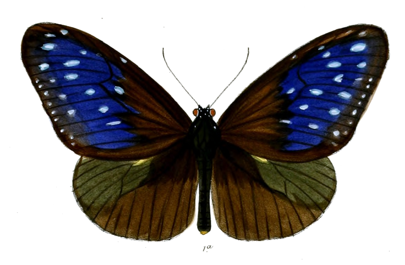 Trepsichrois linnaei = Euploea mulciber